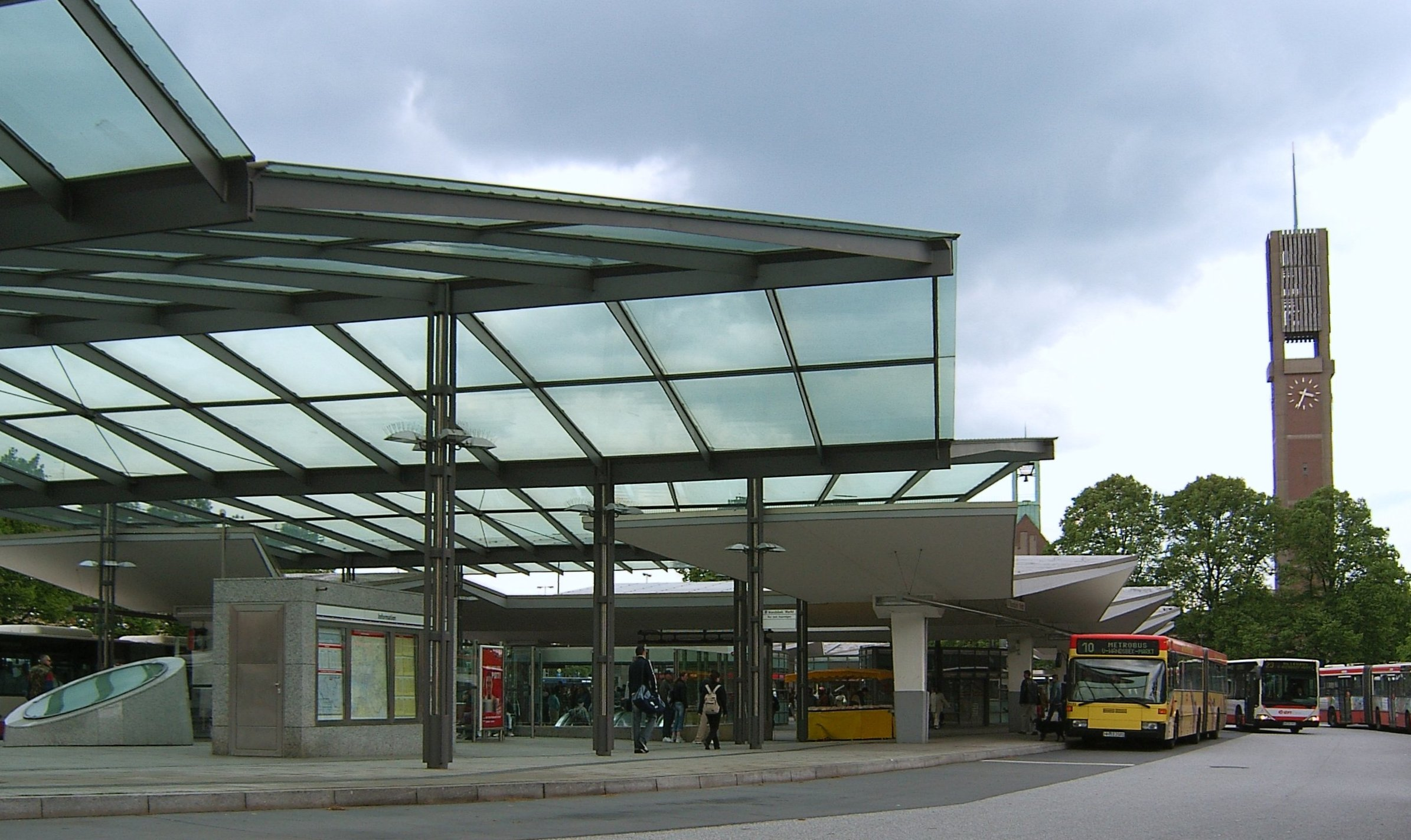 Der Busbahnhof Wandsbek Markt wurde Anfang des 21. Jahrhunderts grundlegend renoviert. Rechts ist der Turm der Christuskirche zu sehen. This is a photograph of an architectural monument.